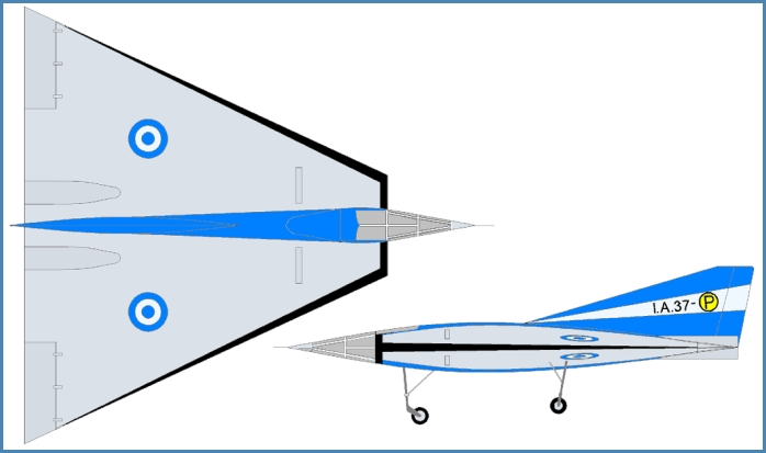 Horten IAe3/ -- ARGENTINIEN 1953